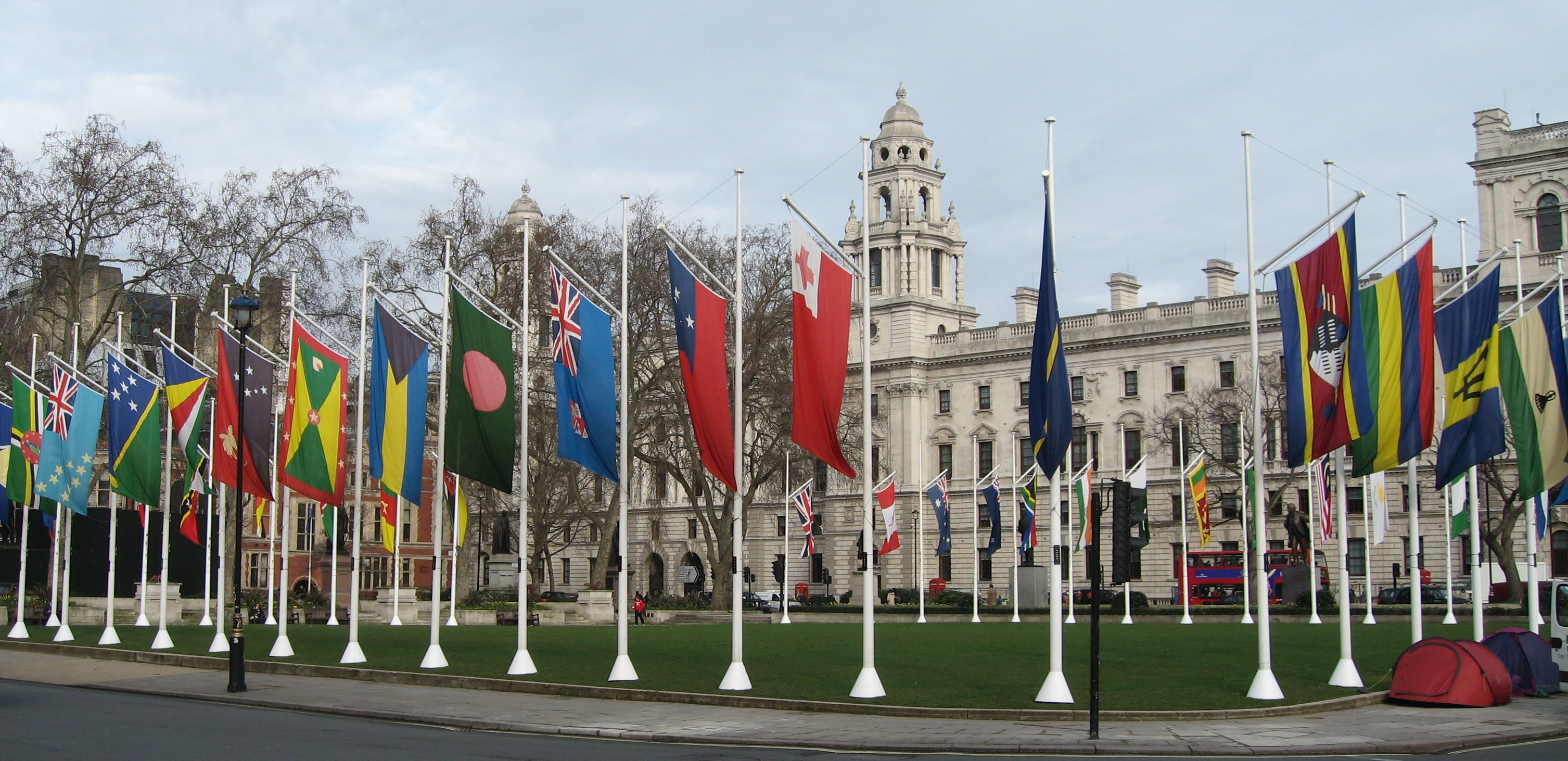 Parliament Square 11/3/09